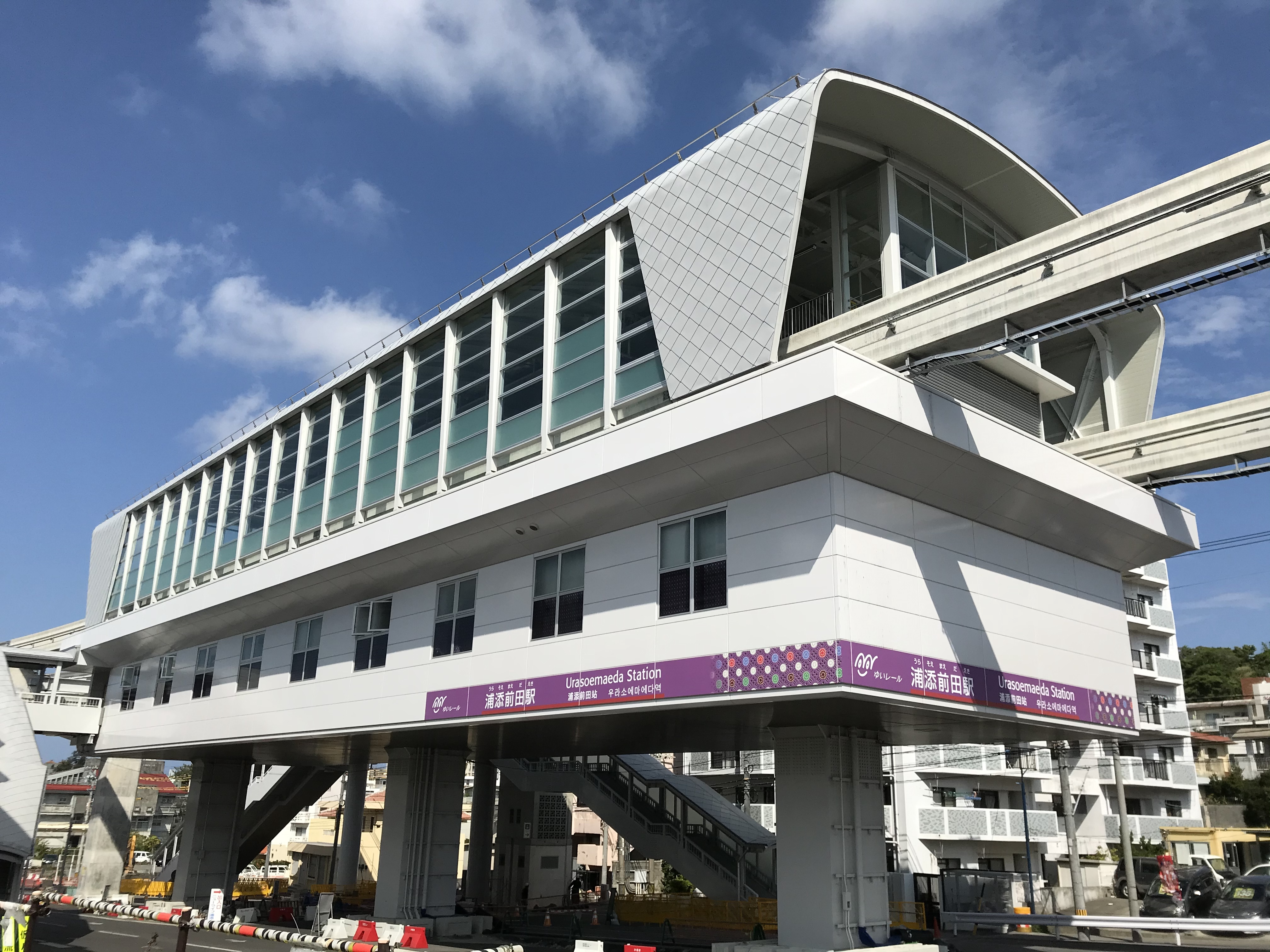 沖縄都市モノレール（ゆいレール）浦添前田駅